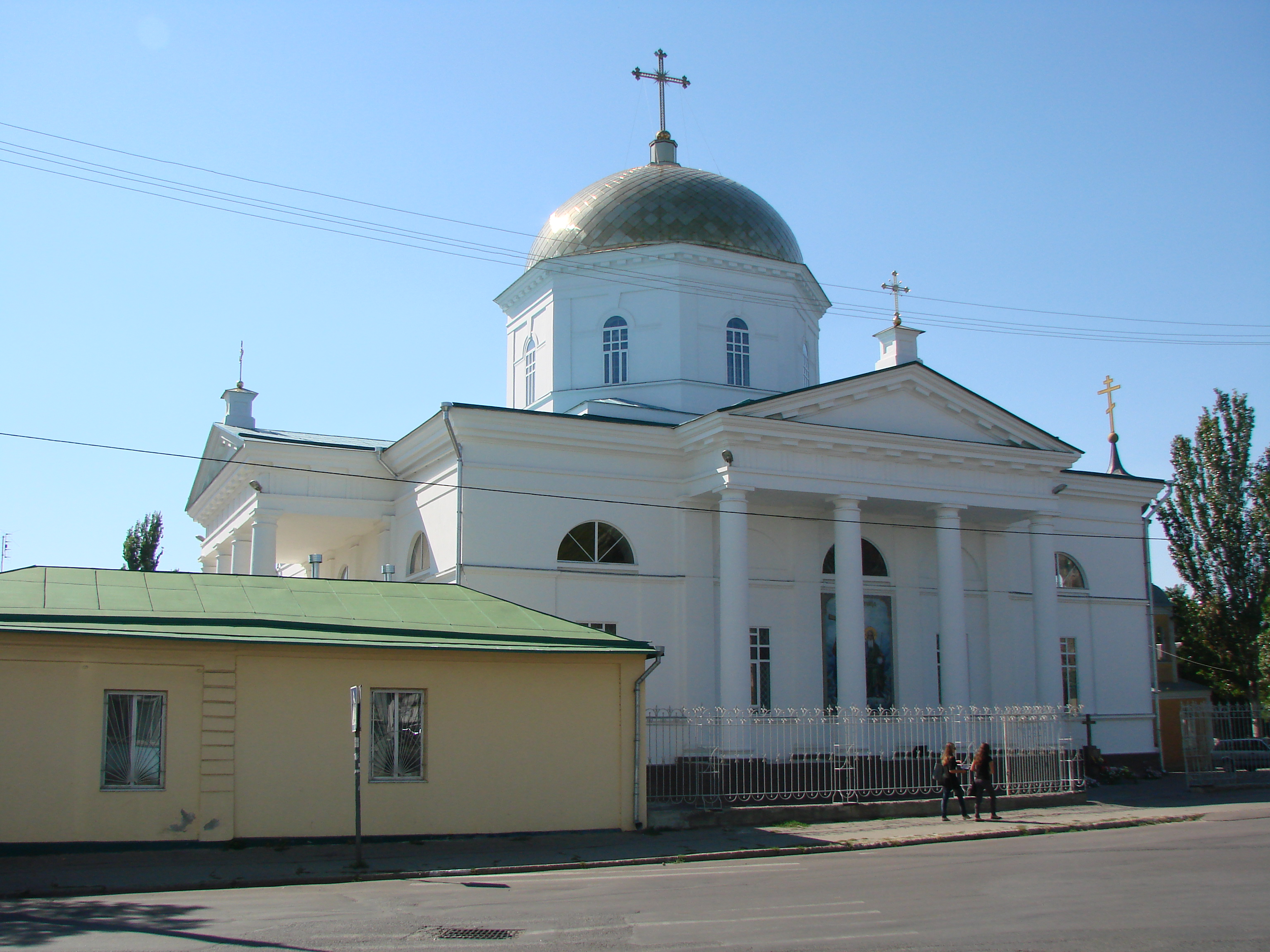 Свято-Духівський собор